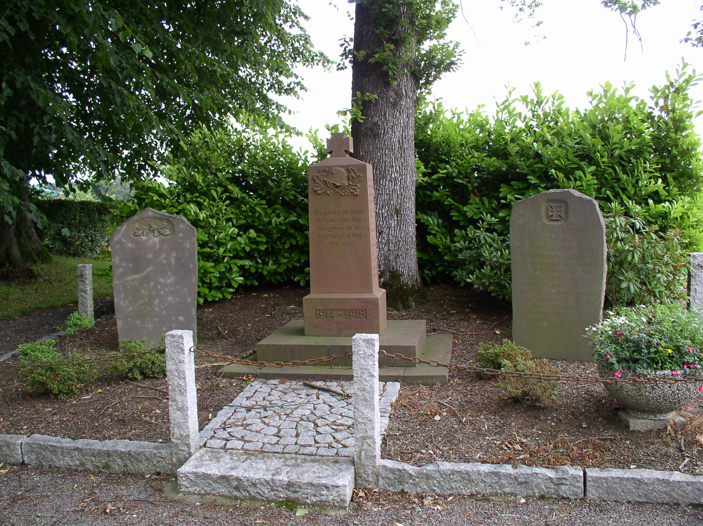 Kriegsdenkmal in Schulten-Hedfeld (Halver)